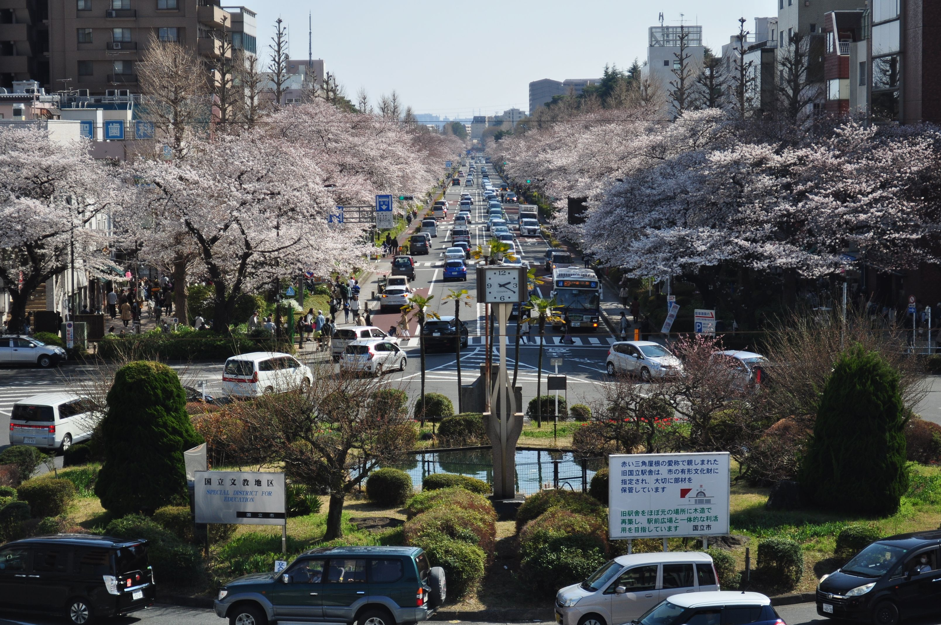 国立市 国立大学通り